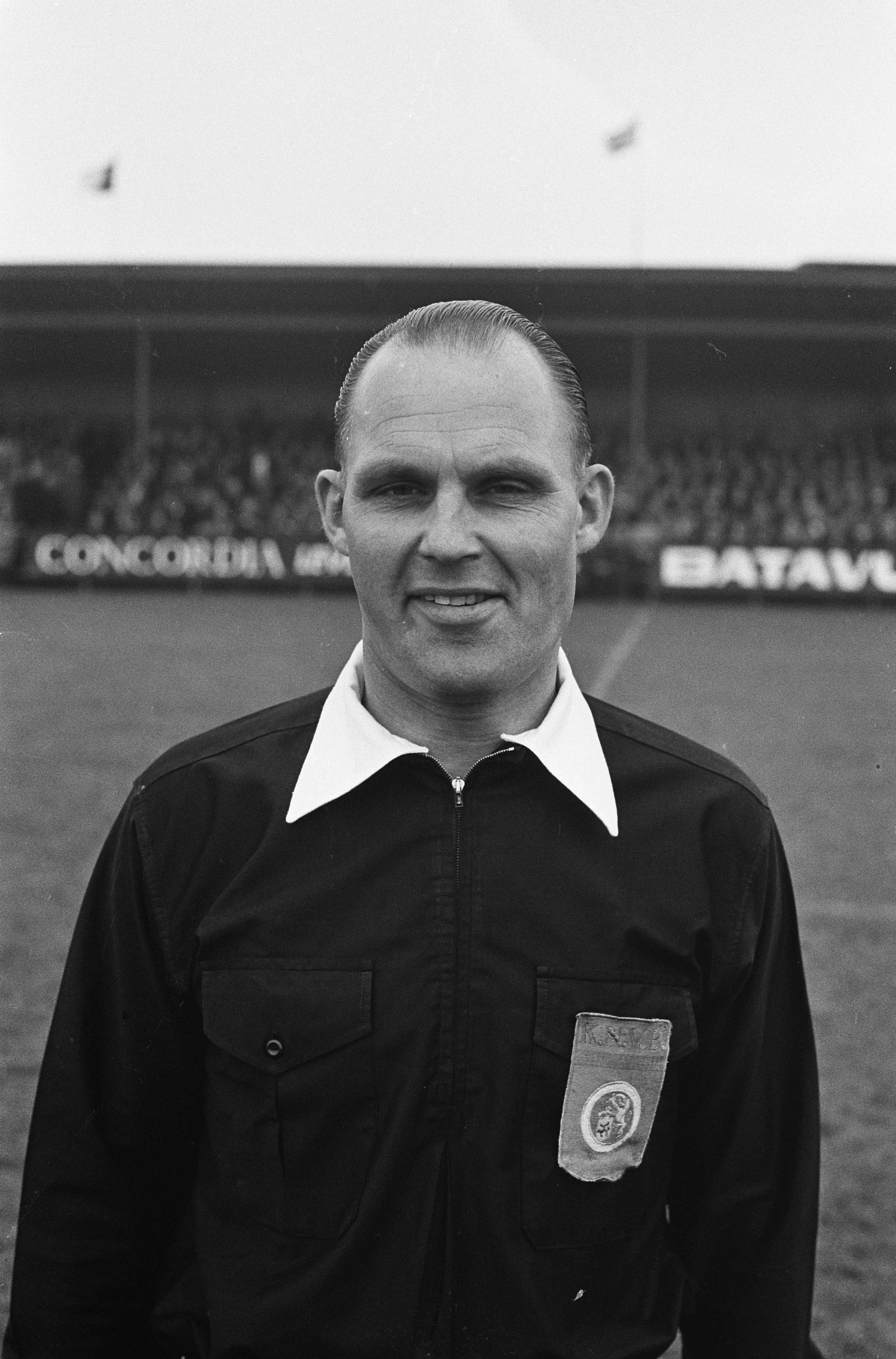 Collectie / Archief : Fotocollectie Anefo Reportage / Serie : [ onbekend ] Beschrijving : Sparta tegen DWS 4-2. Scheidsrechter Datum : 27 oktober 1963 Trefwoorden : scheidsrechters, sport, voetbal Instellingsnaam : Sparta Fotograaf : Gelderen, Hugo van / Anefo Auteursrechthebbende : Nationaal Archief Materiaalsoort : Negatief (zwart/wit) Nummer archiefinventaris : bekijk toegang 2.24.01.05 Bestanddeelnummer : 915-6759